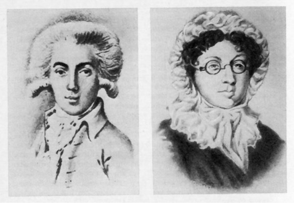 Дмитрий Маркович и Анна Петровна Полторацкие